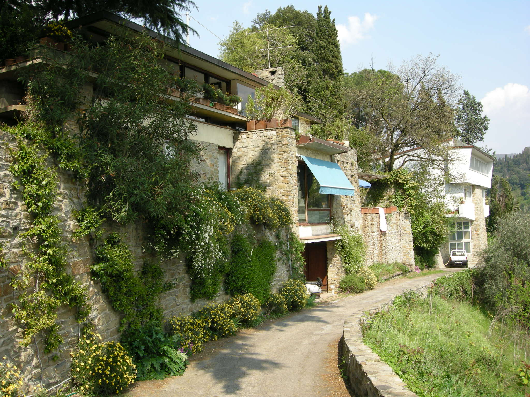 Complesso di monterinaldi